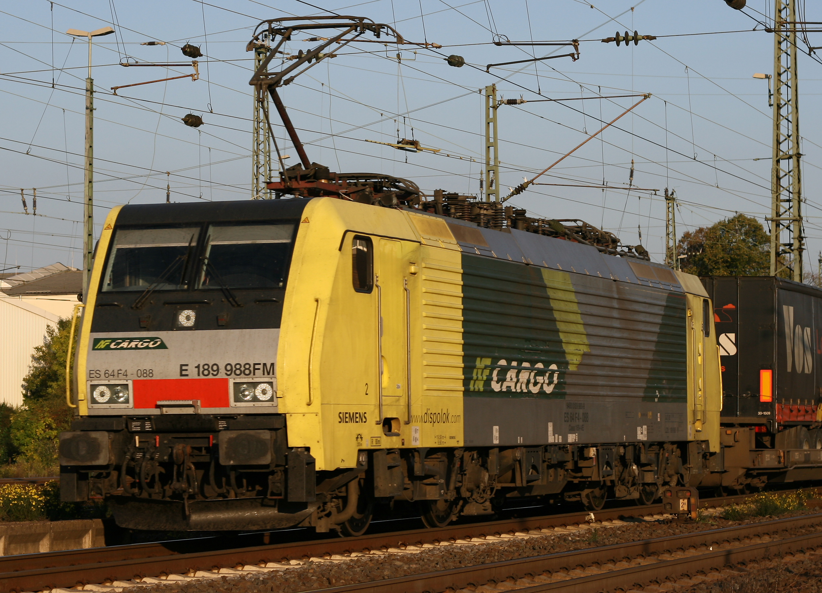 ES 64 F4 - 088 Dispolok (vermietet an Nordcargo) in Neuwied